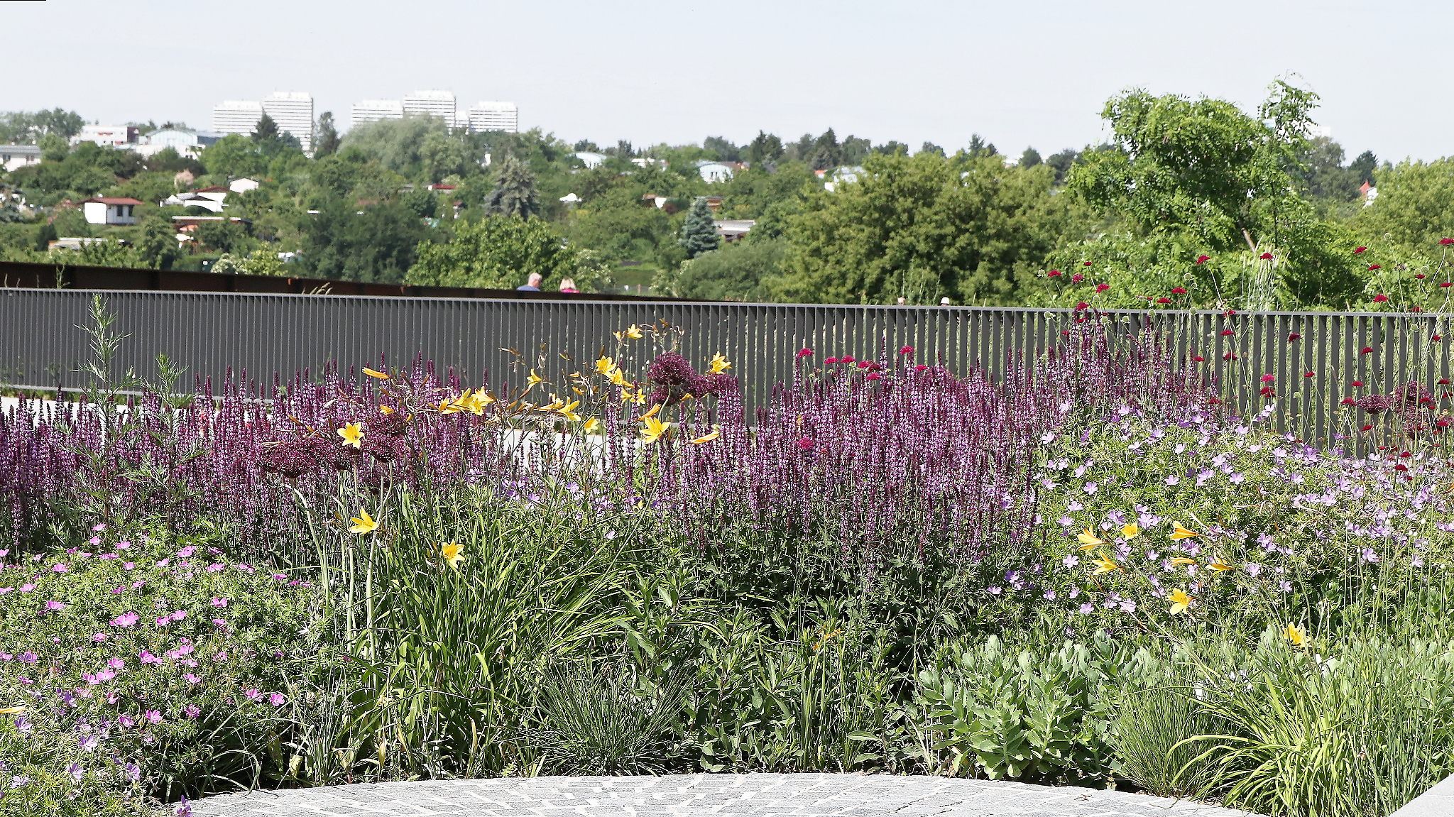 Wechselflorbeet mit Hintergrund Hochhäuser von Marzahn